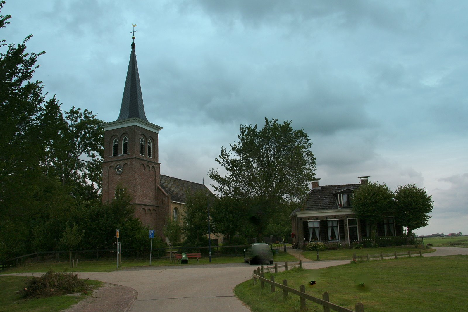 Kerk van het dorp Leons uit de 14e eeuw. Het dorp telt 25 inwoners.